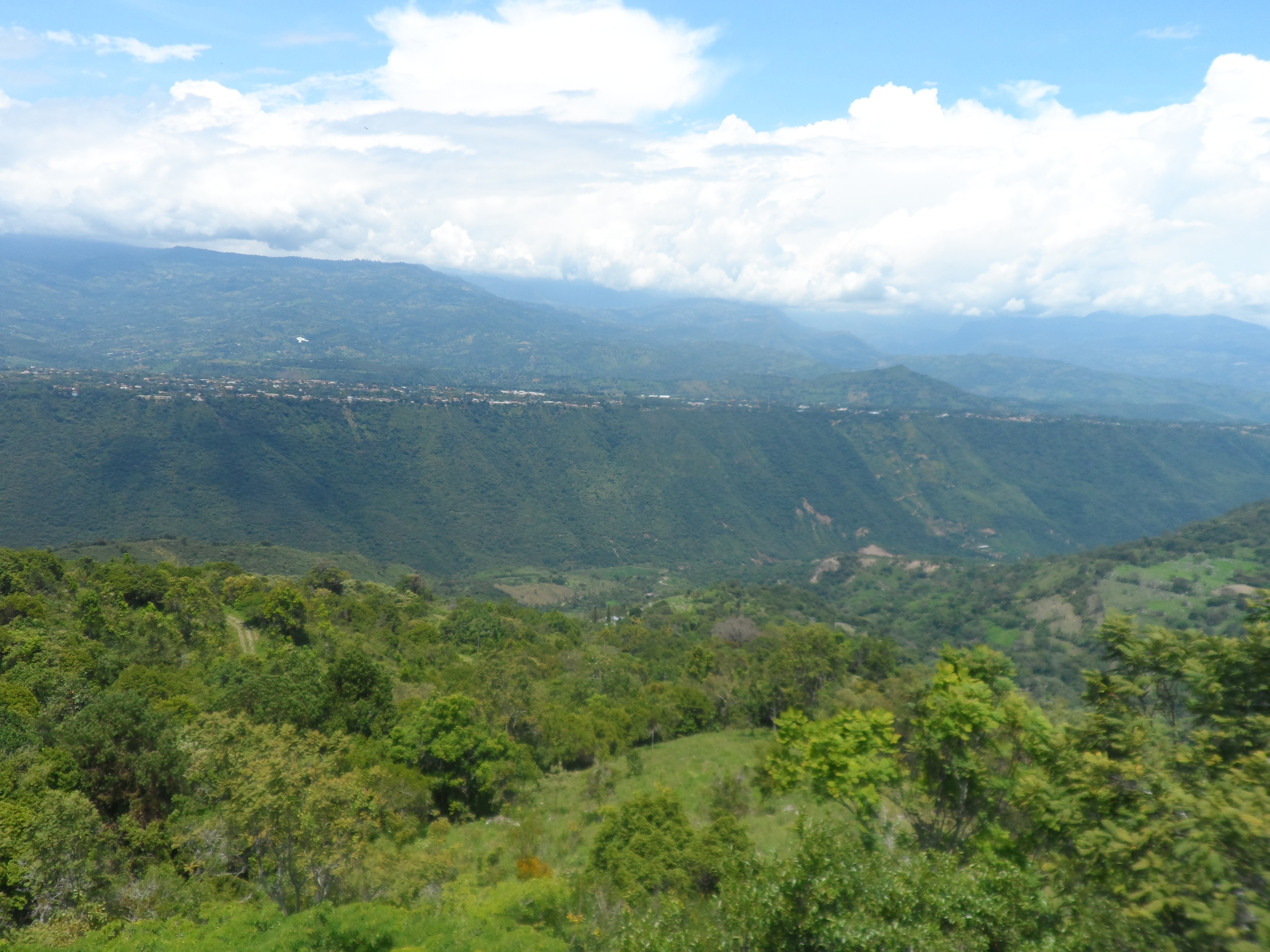 vista del plano de chinauta cundinamarca desde la piedra del diablo en cumaca.